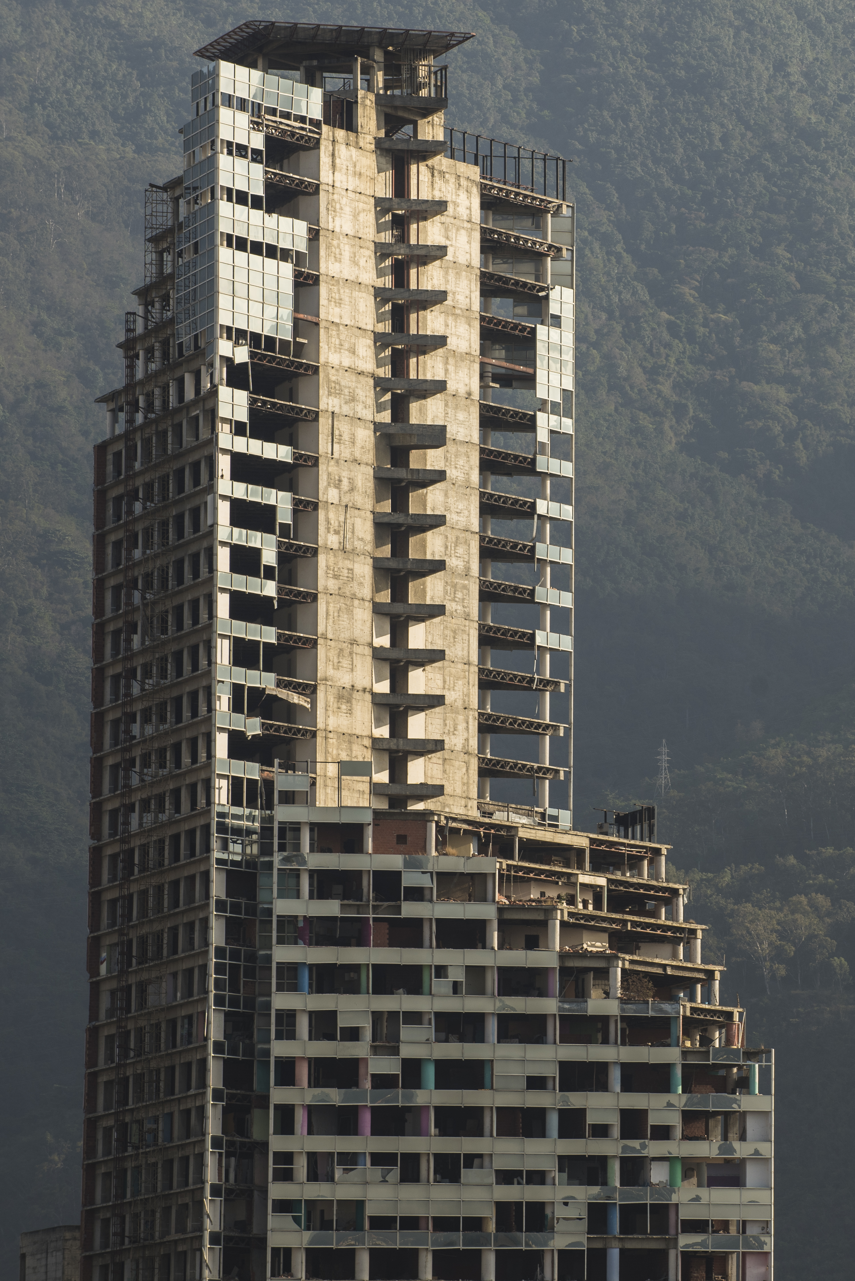 El Centro Financiero Confinanzas, o Torre de David, es un rascacielos no terminado en Caracas, Venezuela. Es el tercer edificio más alto del país. A mediados del 2017, continúa incompleto y sin uso.